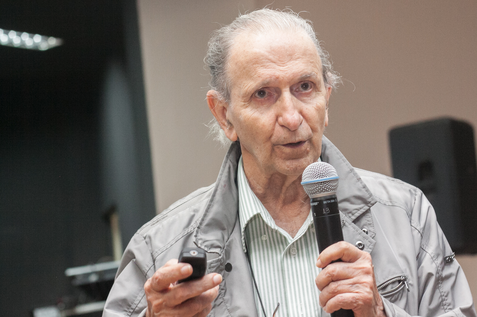 Foto: Mariana Costa